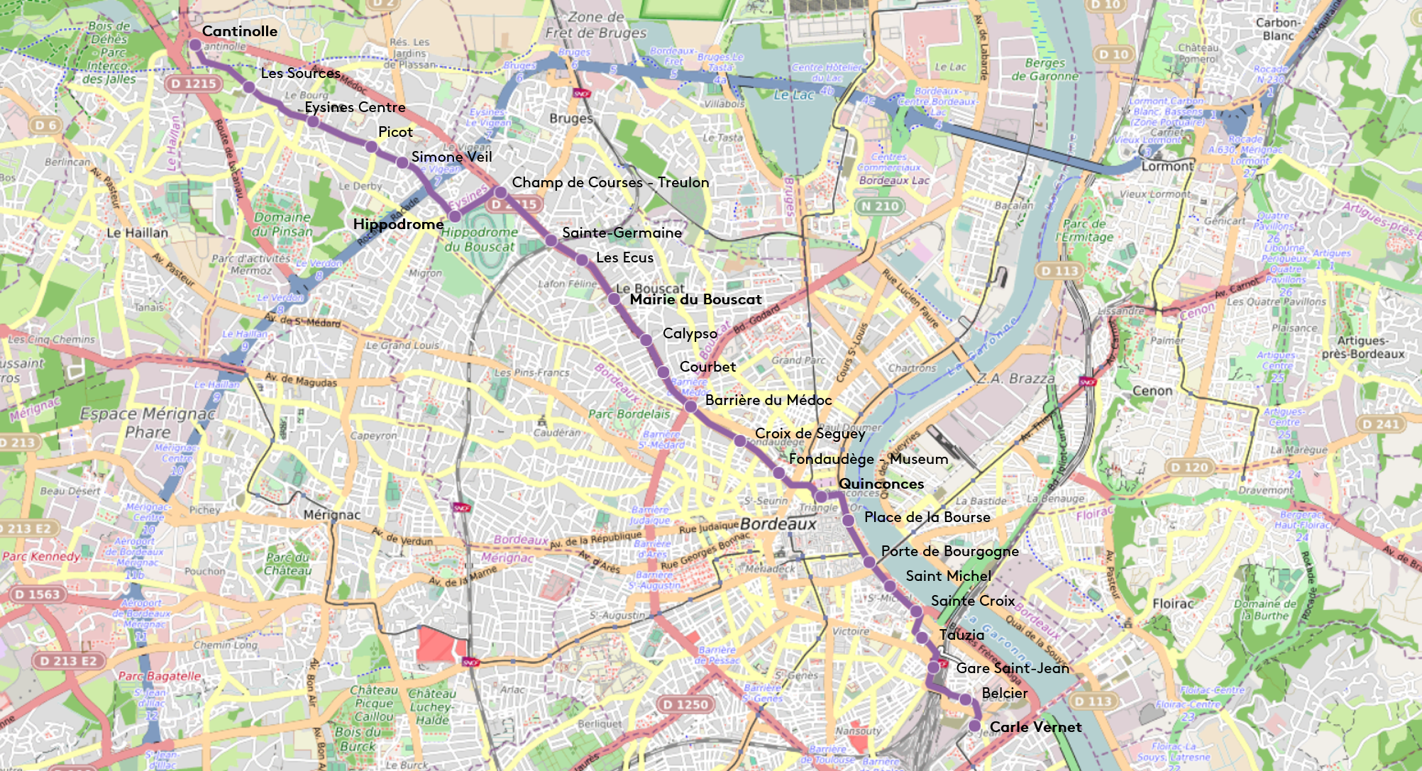 Cette carte représente la ligne D du tramway de Bordeaux.